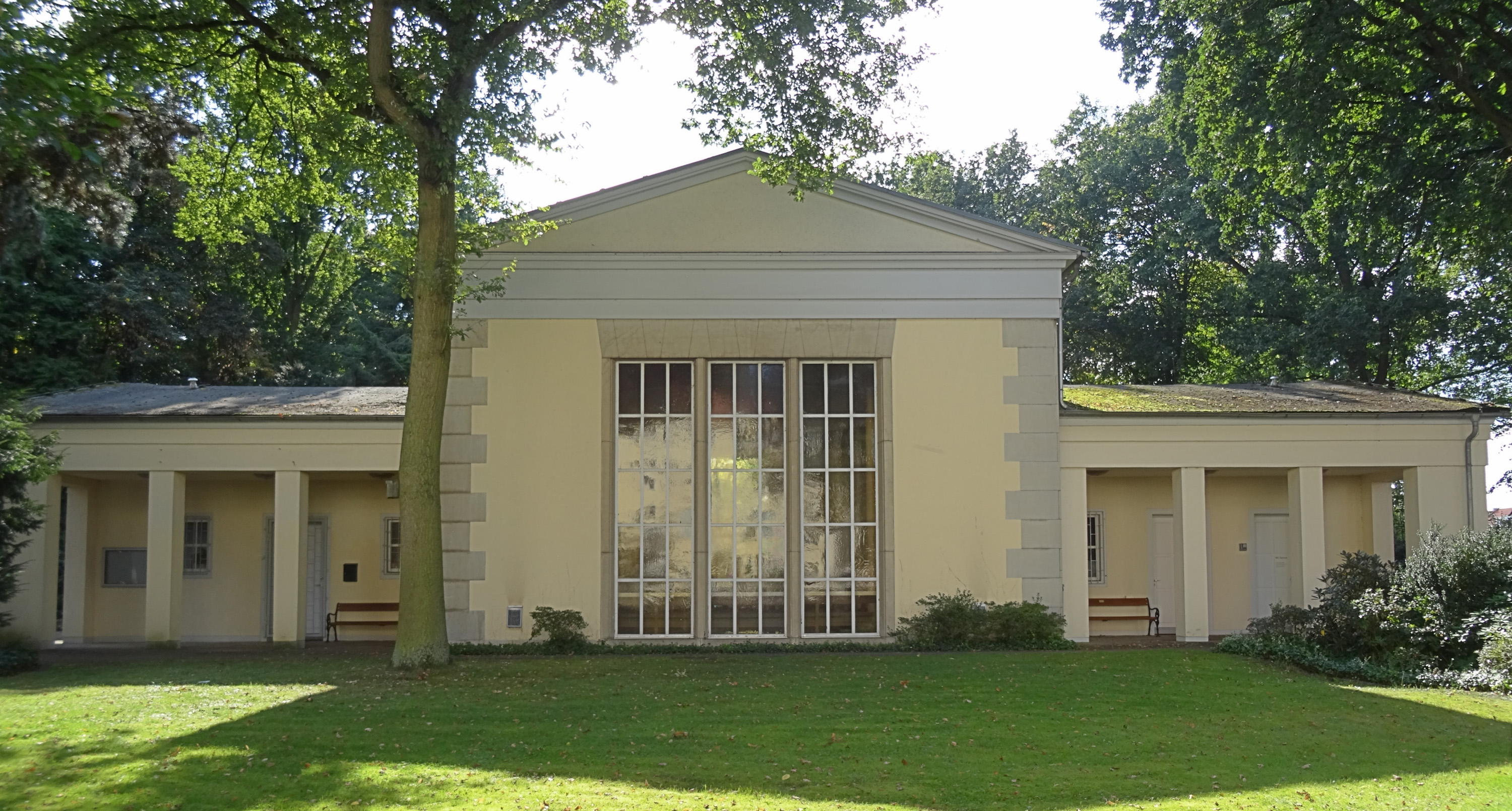 Buntentorsfriedhof in Bremen, Buntentorsteinweg 65Die Gesamtanlage ist ein geschütztes Kulturdenkmal in der Freien Hansestadt Bremen, mit der Nr. 5154 beim Landesamt für Denkmalpflege registriert.